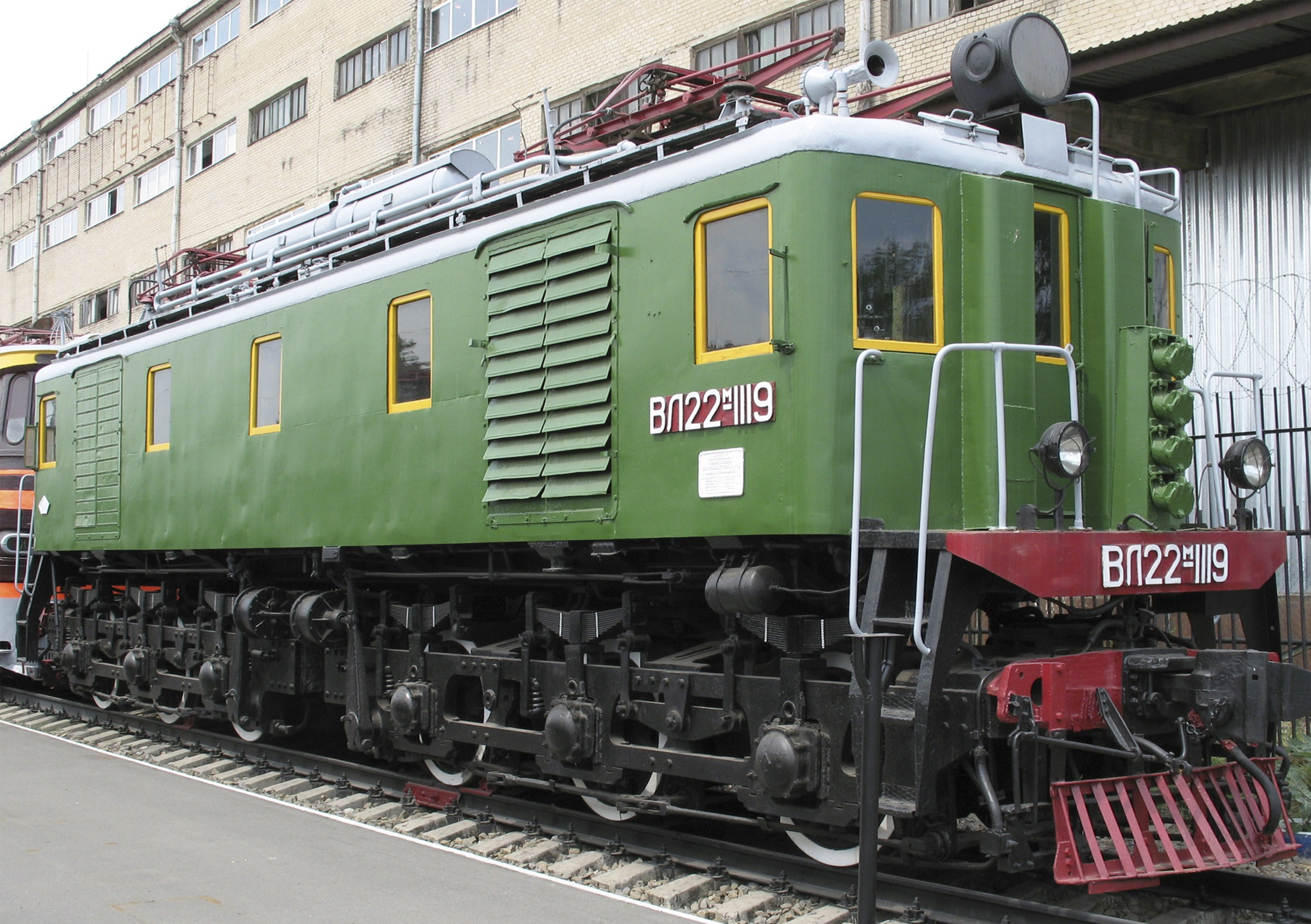 Электровоз построен в 1954 году Новочеркасским электровозостроительным заводом